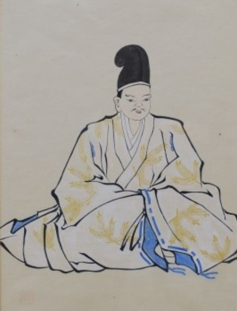 大浦為則の肖像。